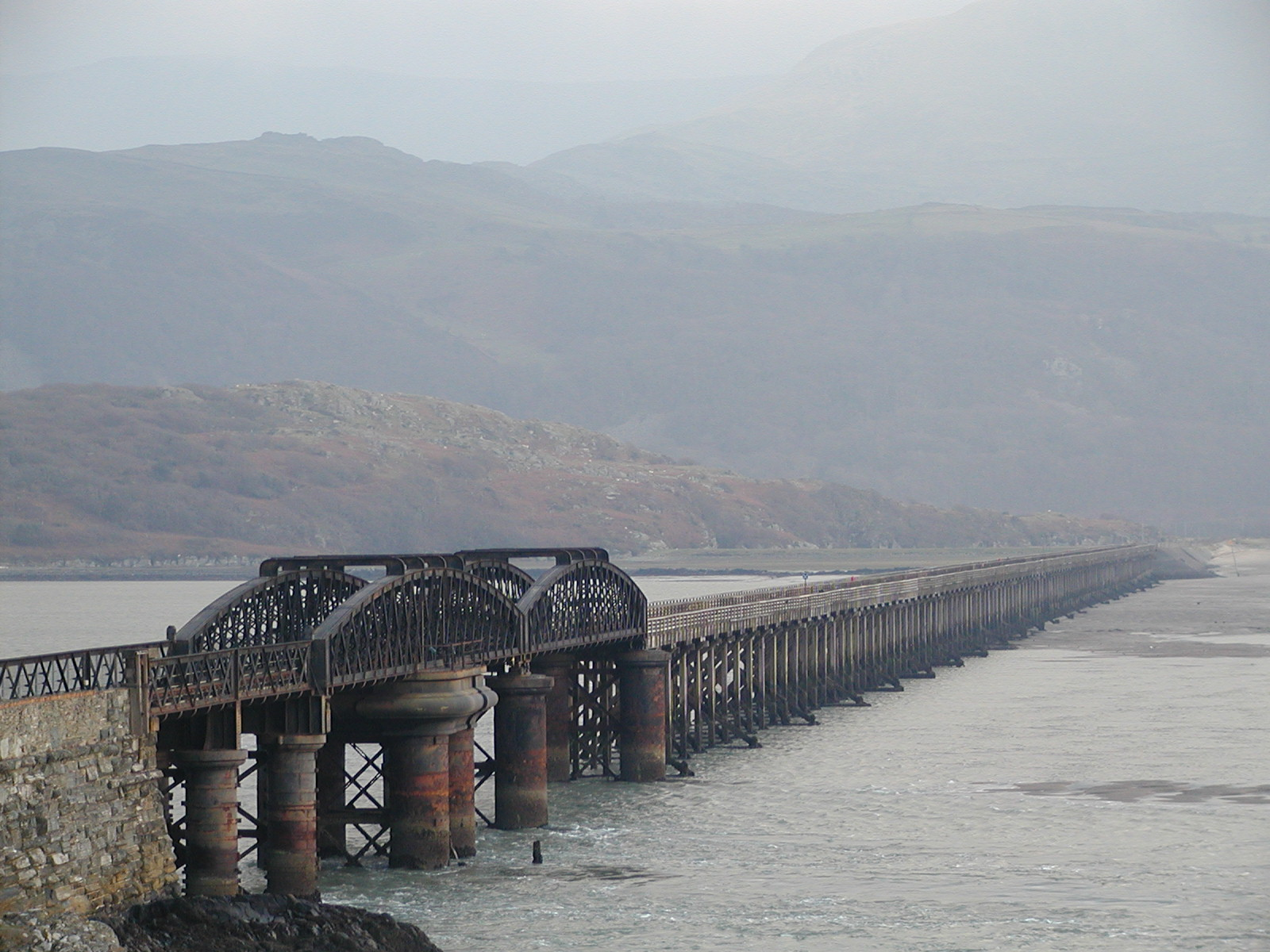 aber Mawddach a phont reilffordd